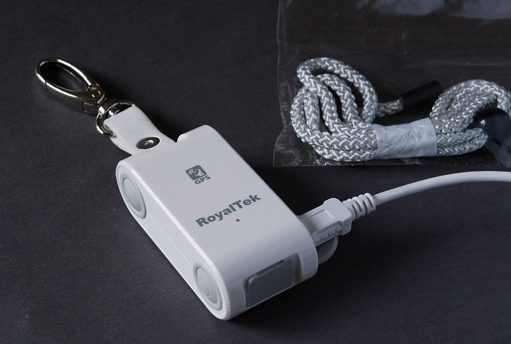 Royaltek RGM-3800 GPS-Logger mit angeschlossenem USB-Kabel zur Datenübertragung, Befestigungsclip und mitgelieferter Kordel